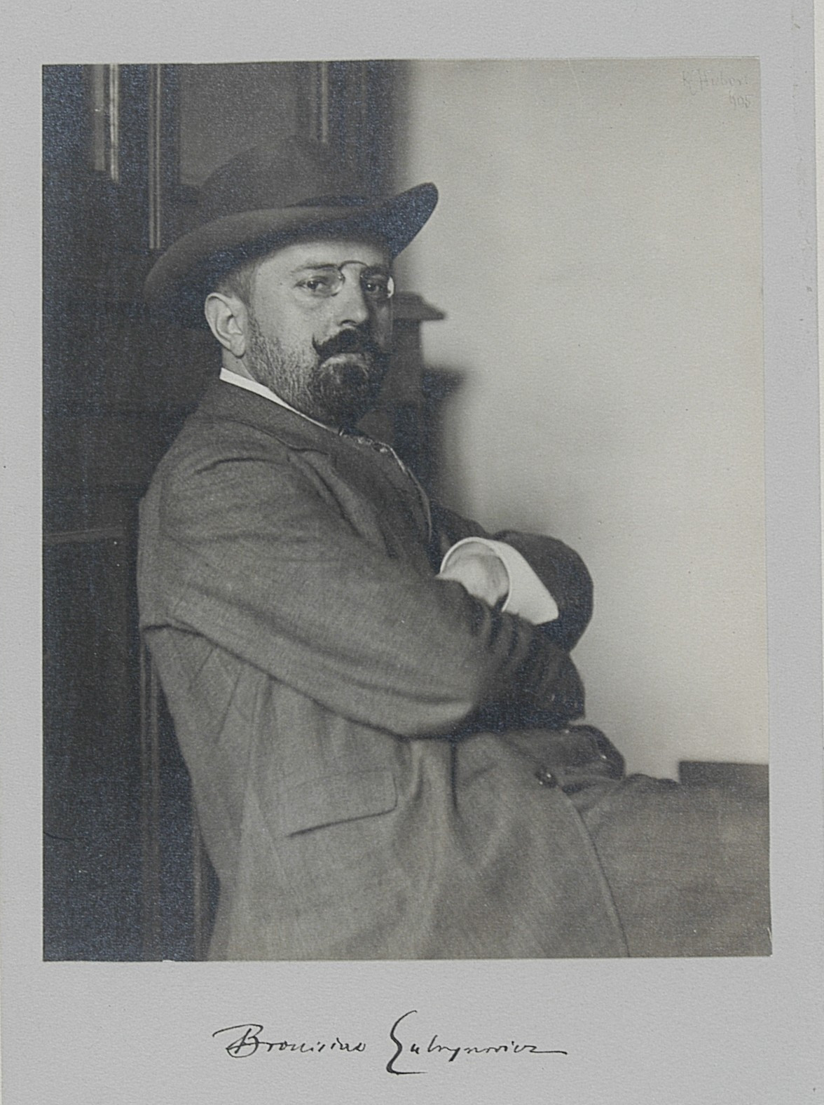 Bronisław Gubrynowicz